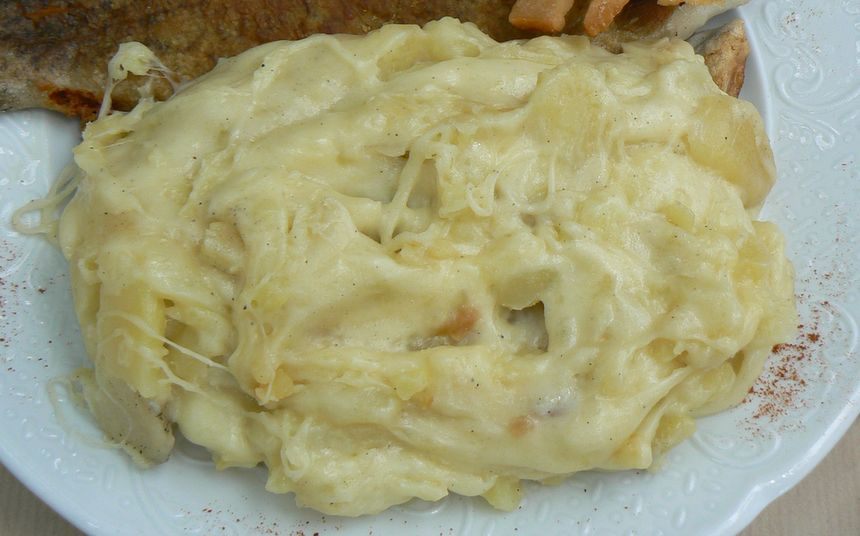 La trufada és un plat occità originari del massís de Cantal, a base de patates i formatge fresc. La paraula en occità ve de "patata" (en occità, "trufa")